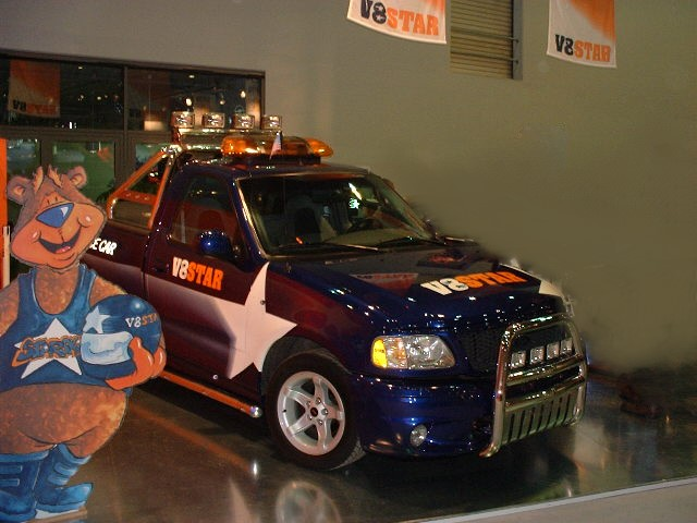 V8-Star Pace Car Essen Motorshow 2001